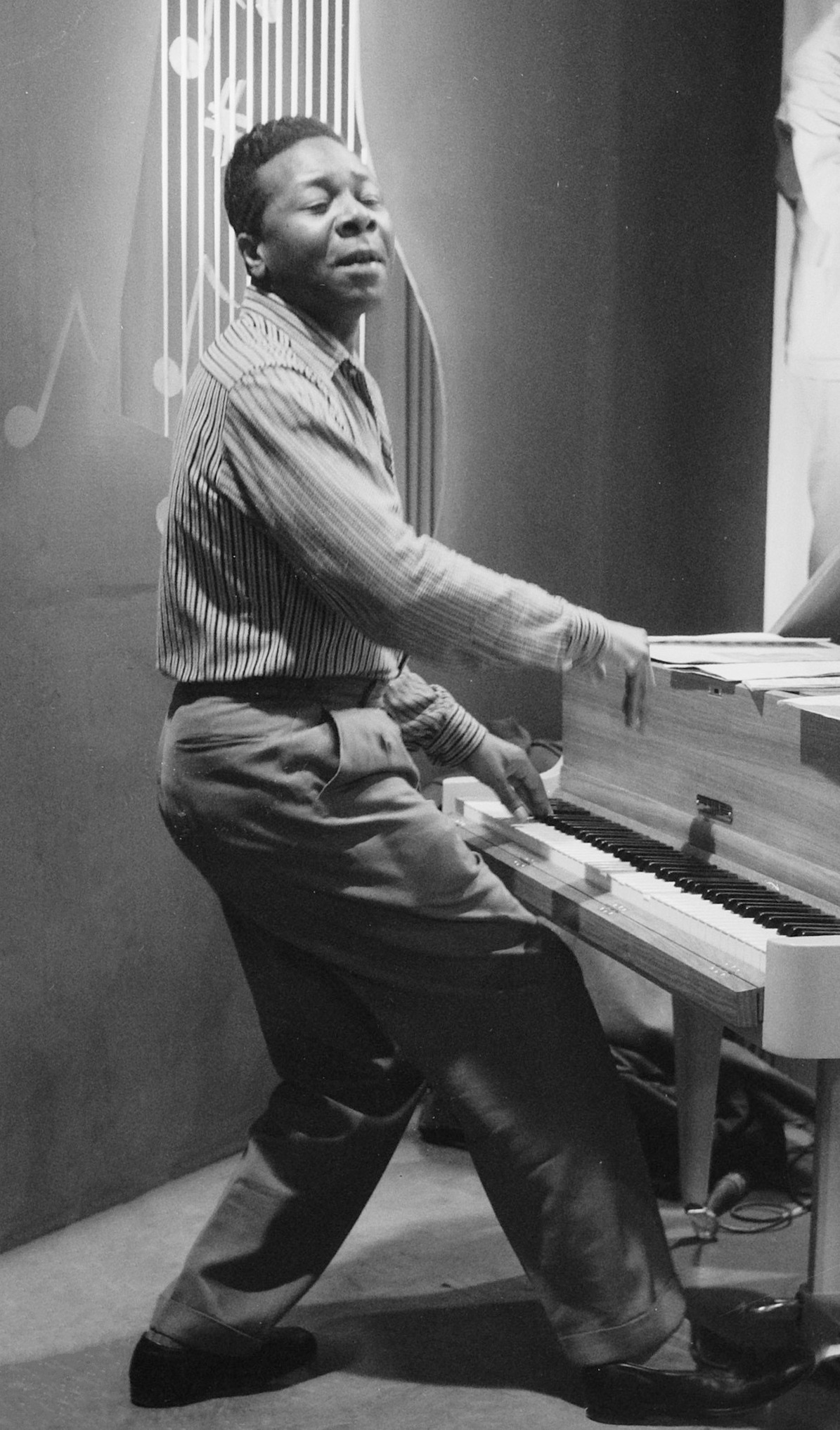 Weekendshow, pianist-zanger Maurice rocco